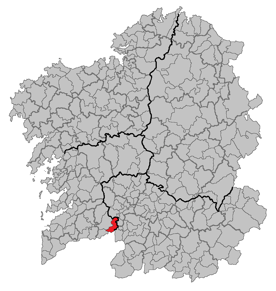 Mapa coa localización do concello de Crecente.